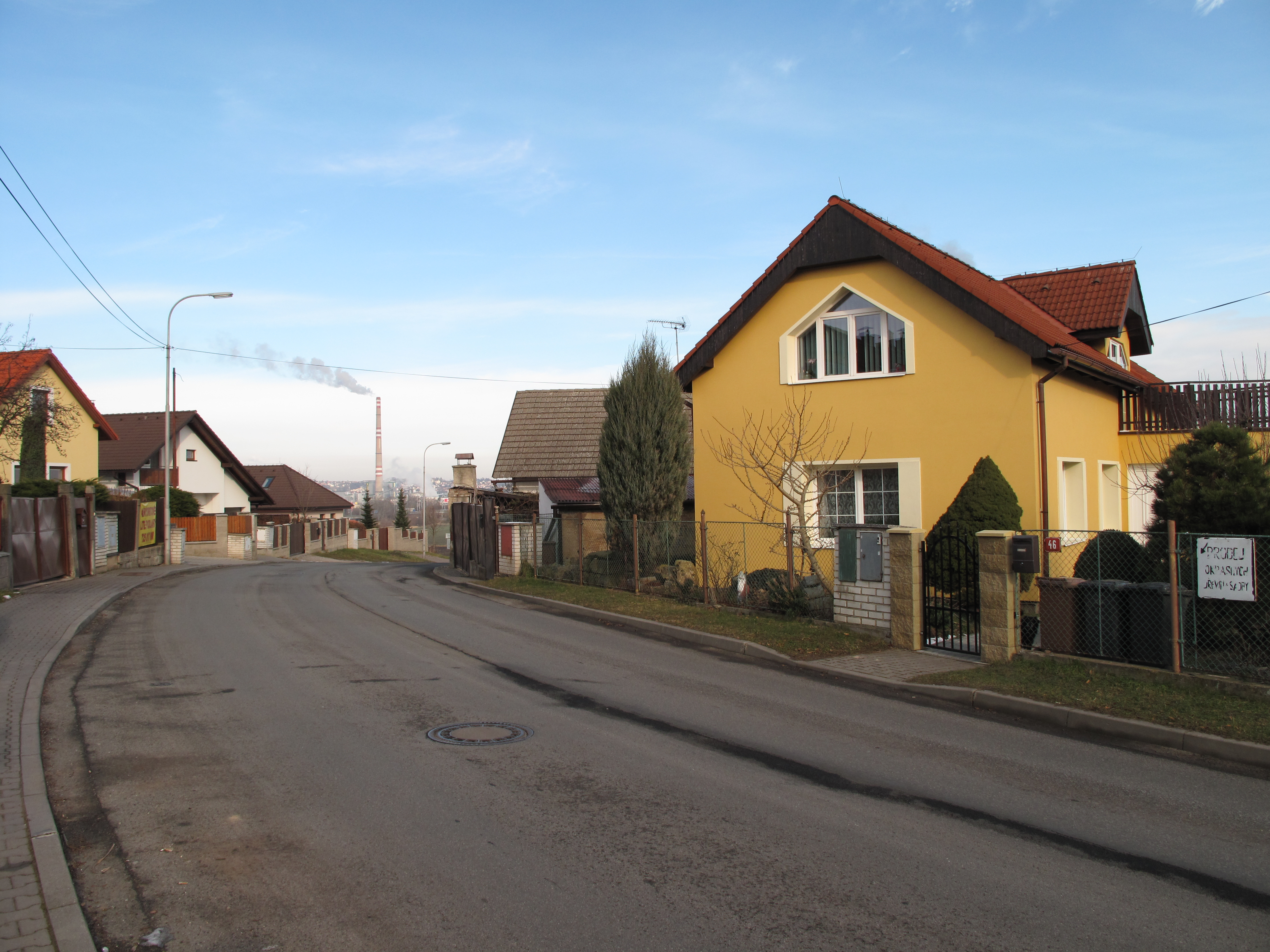 Novostavba v Jemníkách. Okres Mladá Boleslav, Česká republika.